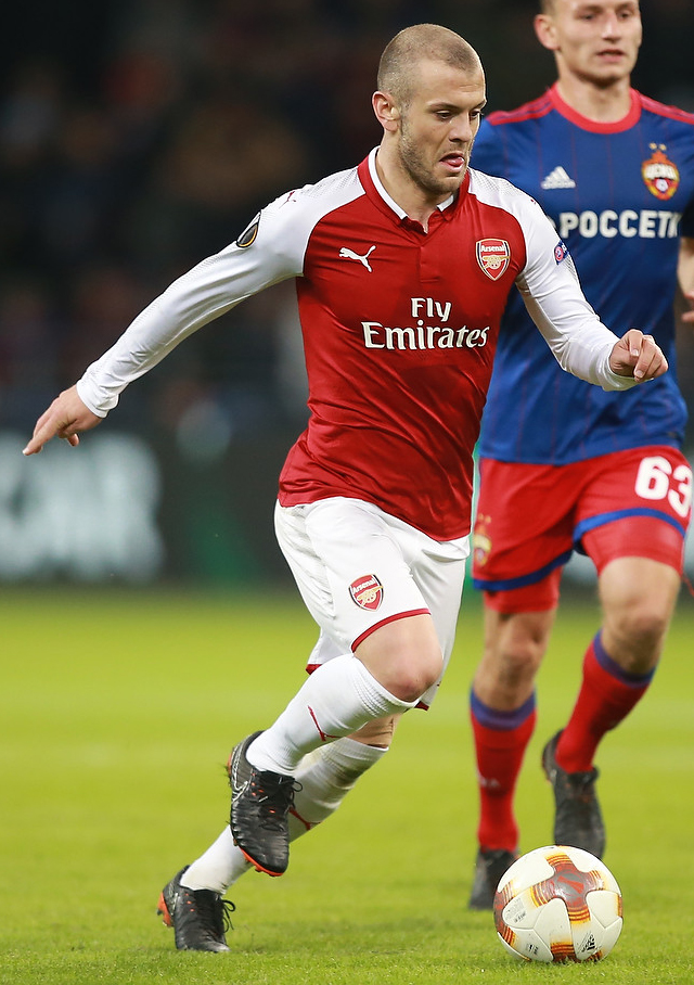 ЦСКА упустил победу над «Арсеналом» и покинул Лигу Европы